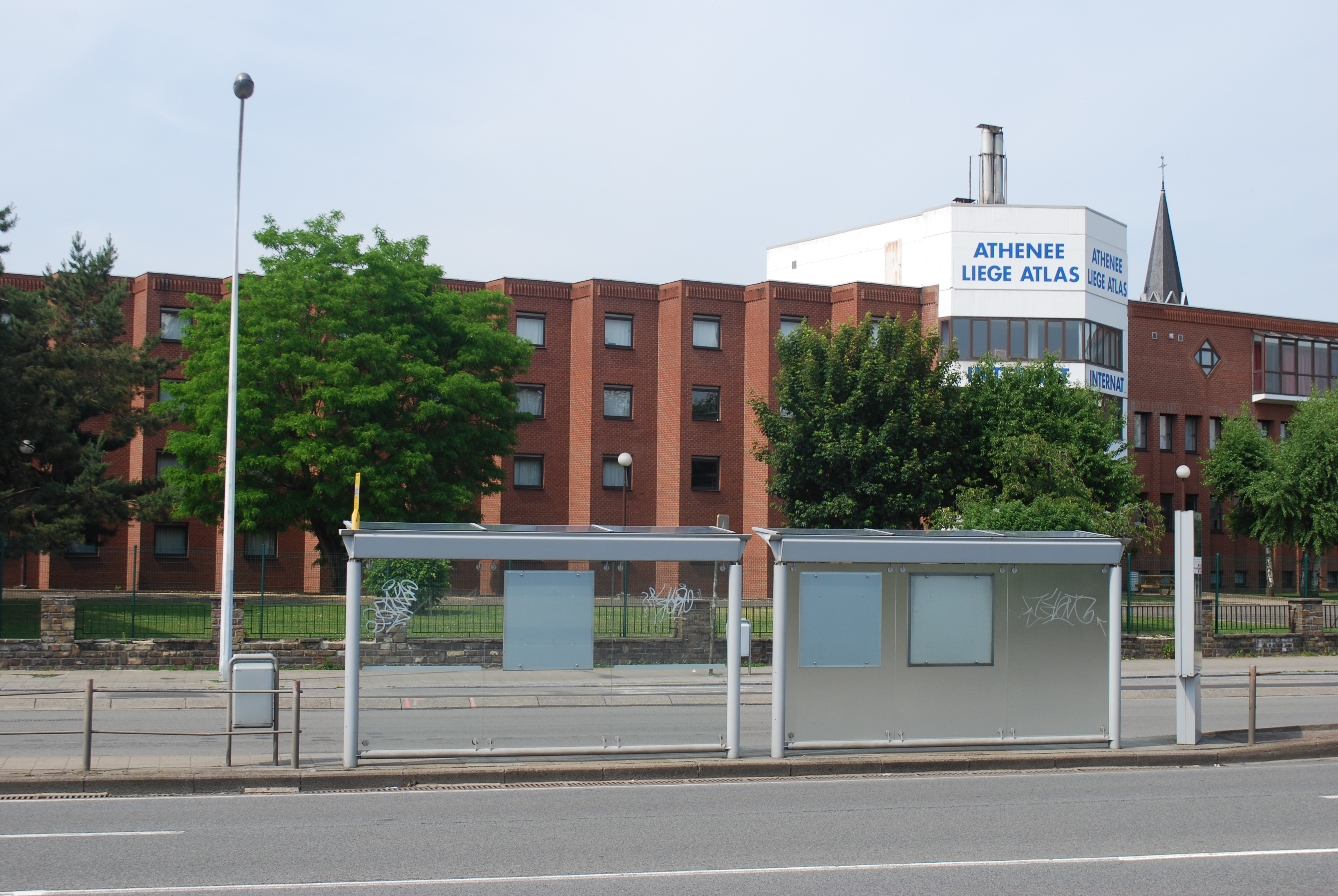 Vue des bords de Meuse à Liège, entre le pont Atlas et le pont Maghin.